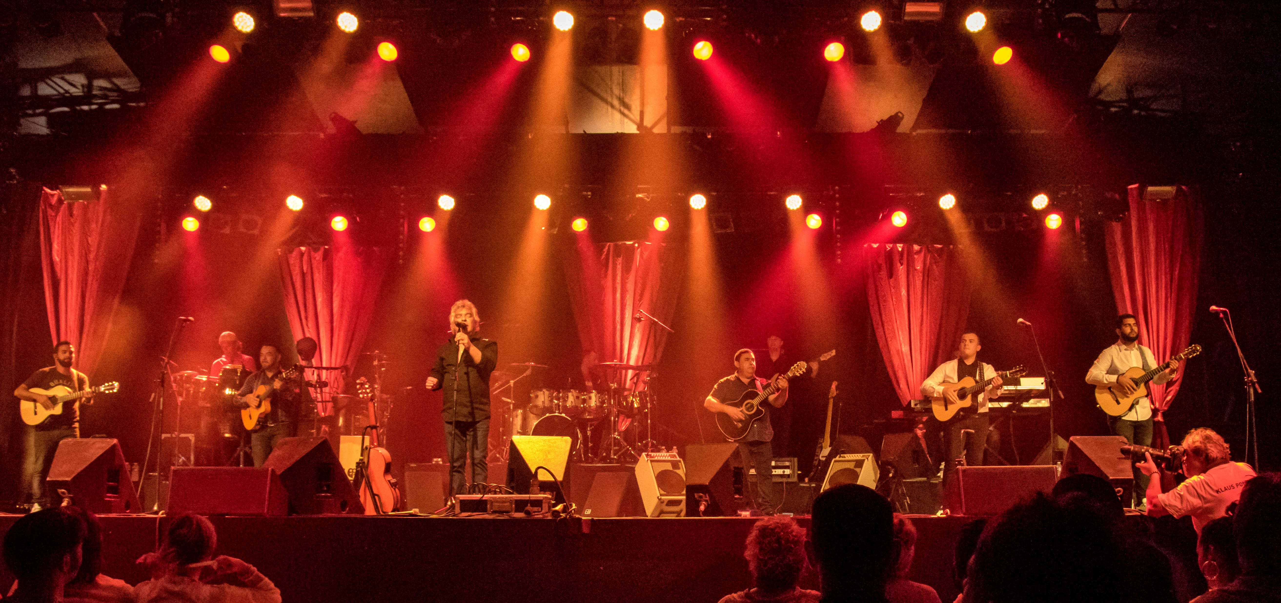 Bilder vom Zelt Musik Festival 2016 in Freiburg im Breisgau Gipsy Kings